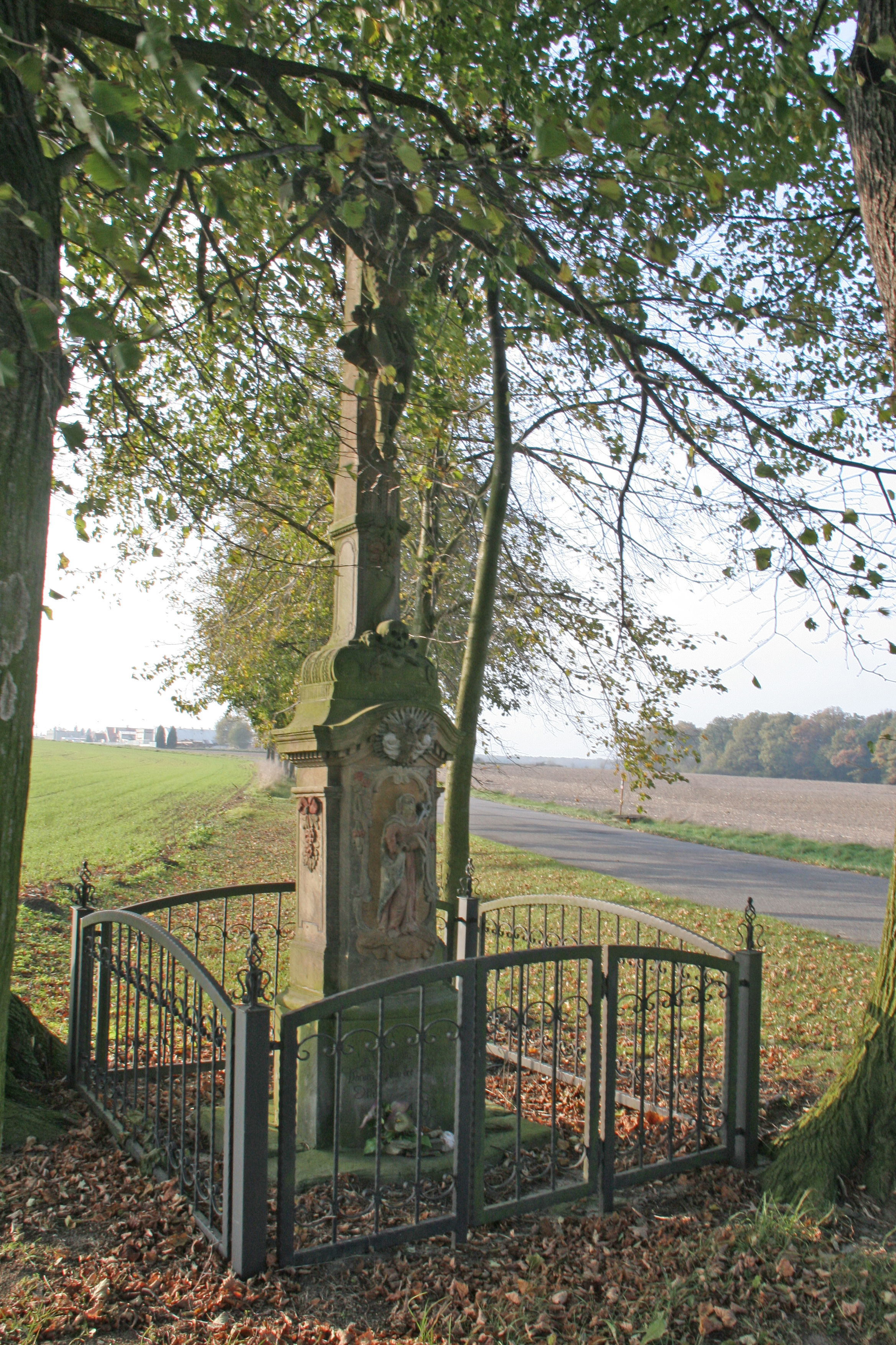 Franclina kříž